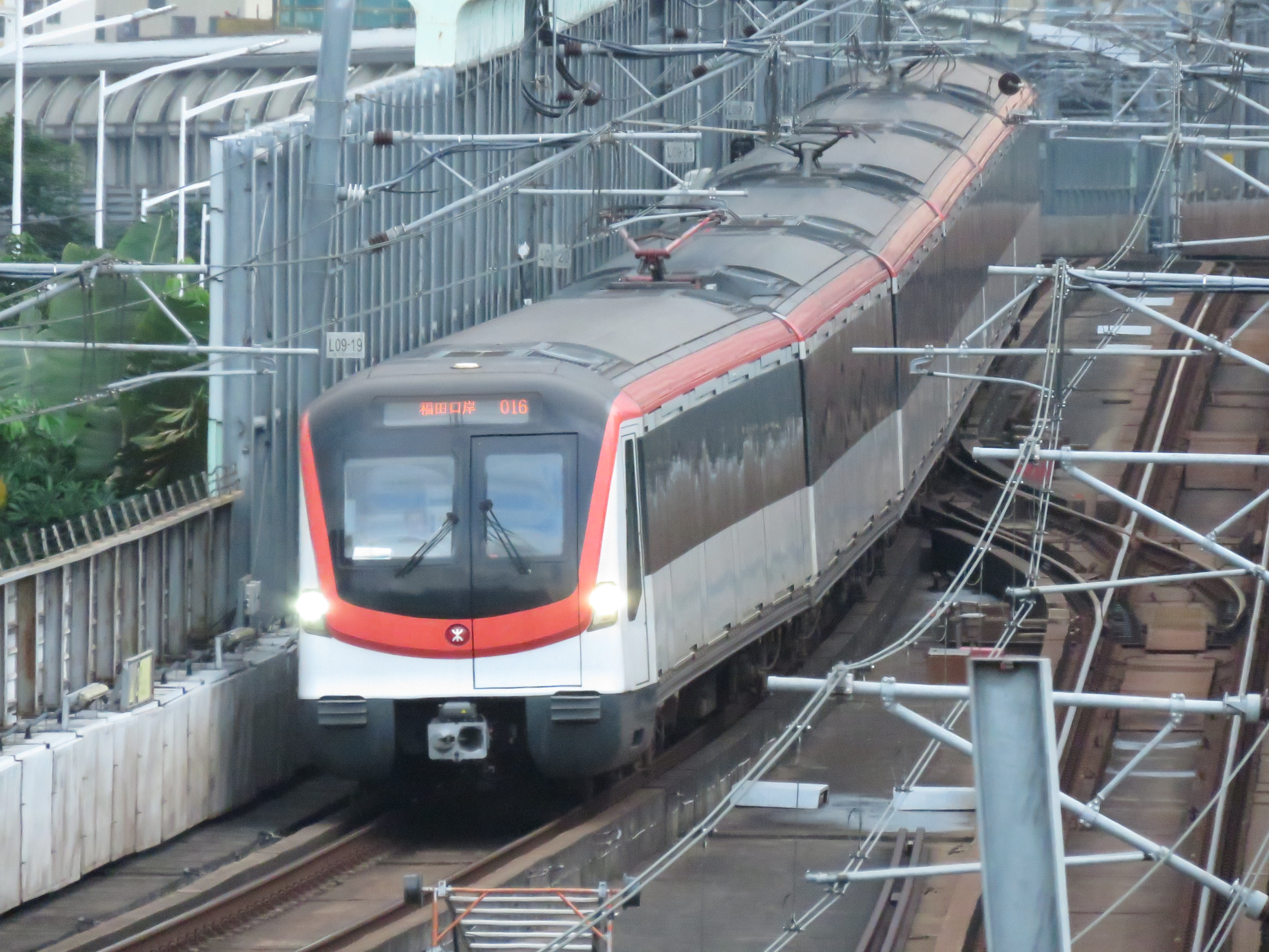 深圳地铁4号线南车浦镇A型车